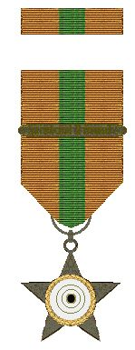 Schietprijsster van het Koninklijk Nederlandsch-Indisch Leger 1936